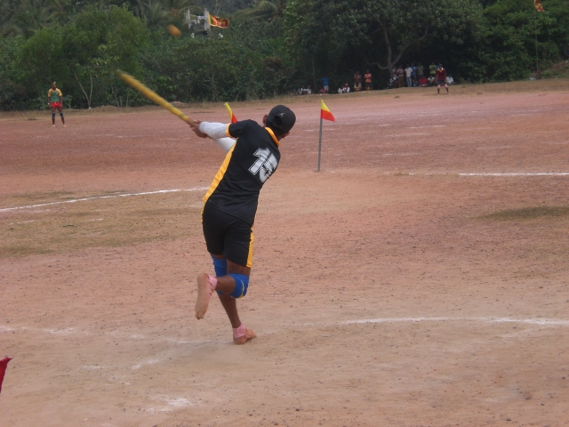 සිංහල: එල්ලය බලා වේගයෙන් පහරක් එල්ල කිරිම